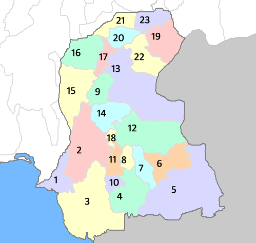 Twenty three districts of Sindh, Pakistan. 1. Karachi 2. Jamshoro 3. Thatta 4. Badin 5. Tharparkar 6. Umerkot 7. Mirpur Khas 8. Tando Allahyar 9. Naushahro Feroze 10. Tando Muhammad Khan 11. Hyderabad 12. Sanghar 13. Khairpur 14. Nawabshah 15. Dadu 16. Qambar Shahdadkot 17. Larkana 18. Matiari 19. Ghotki 20. Shikarpur 21. Jacobabad 22. Sukkur 23. Kashmore